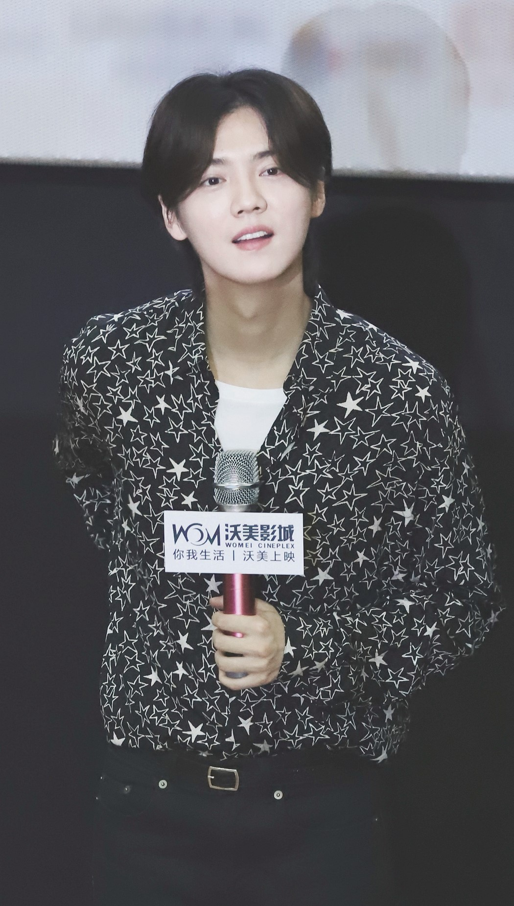 鹿晗合肥路演